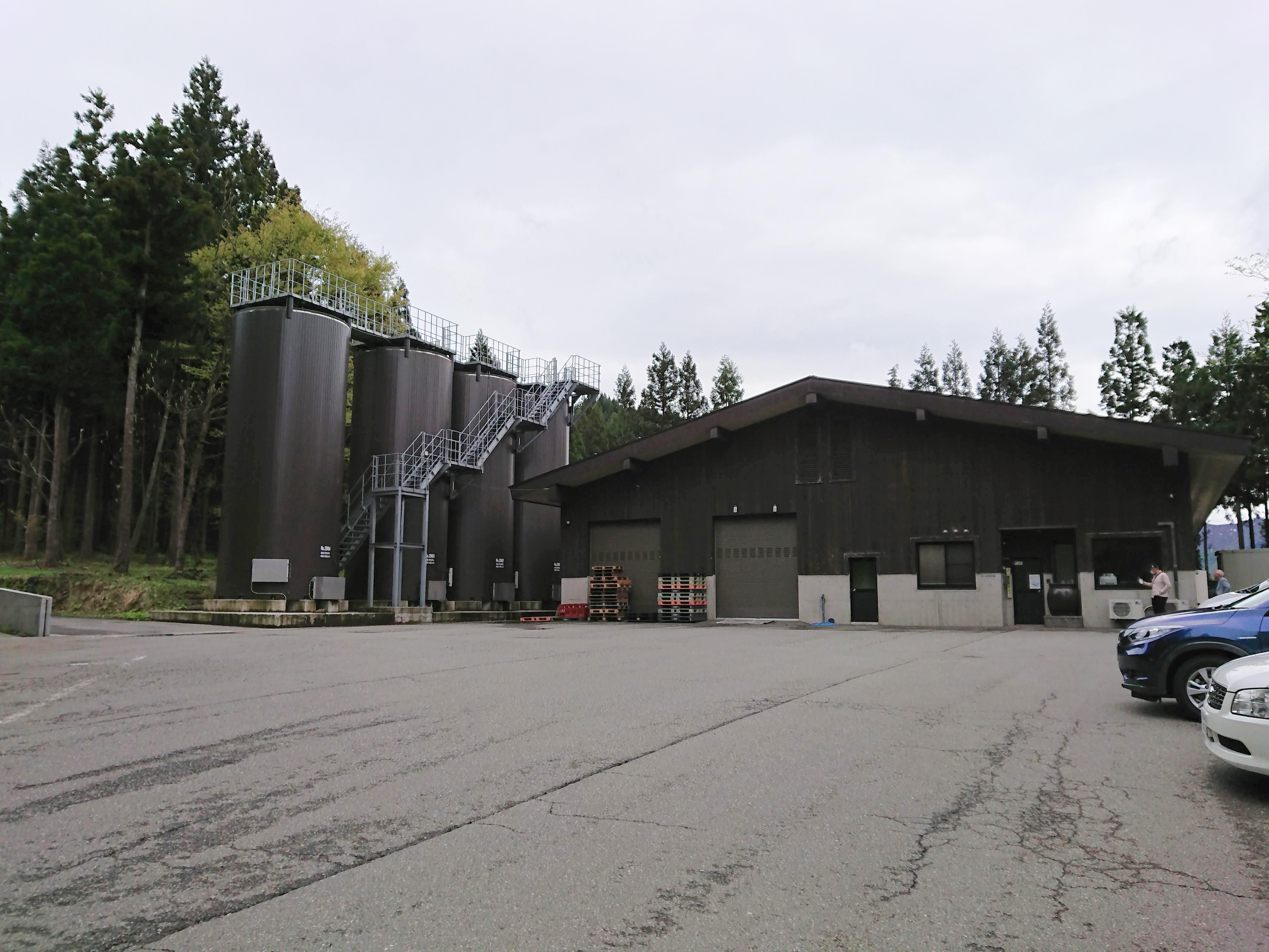 八海醸造の工場